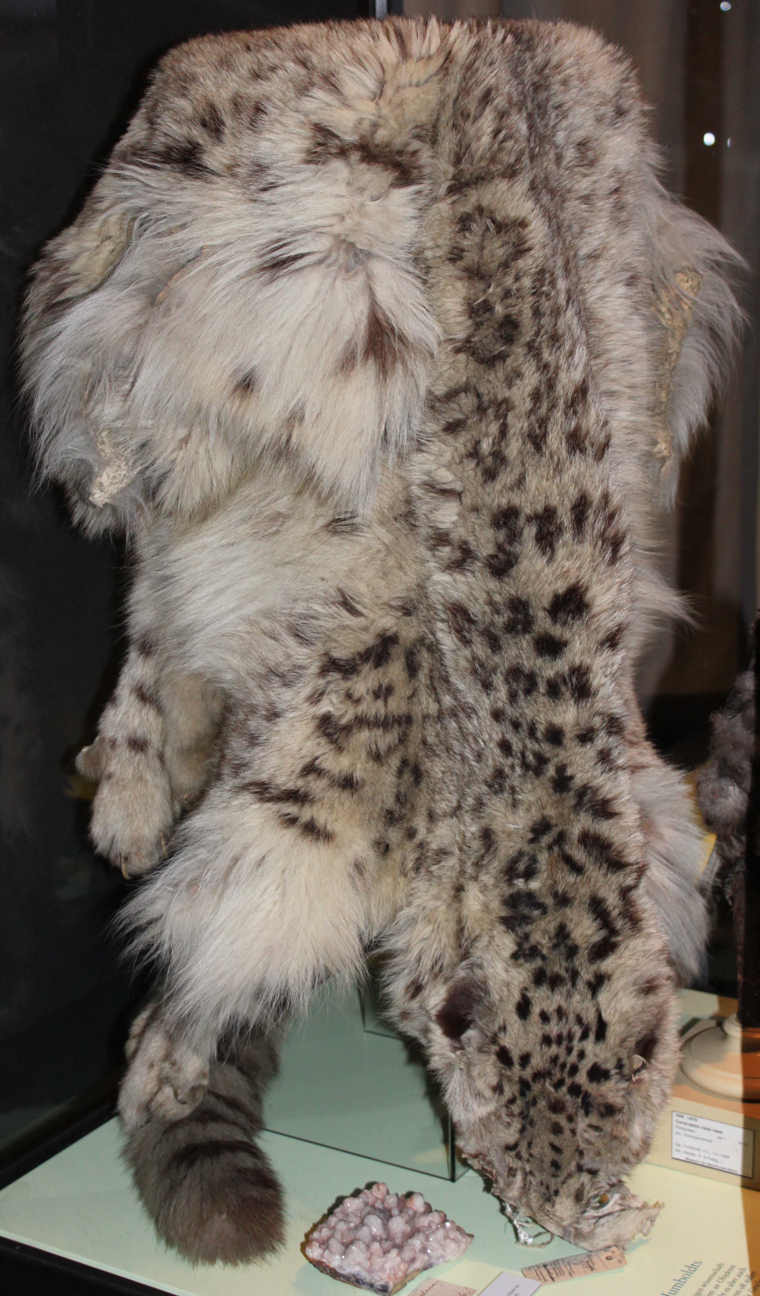 präpariertes Fell eines Schneeleoparden im Naturkundemuseum Berlin (1775 erlegt)